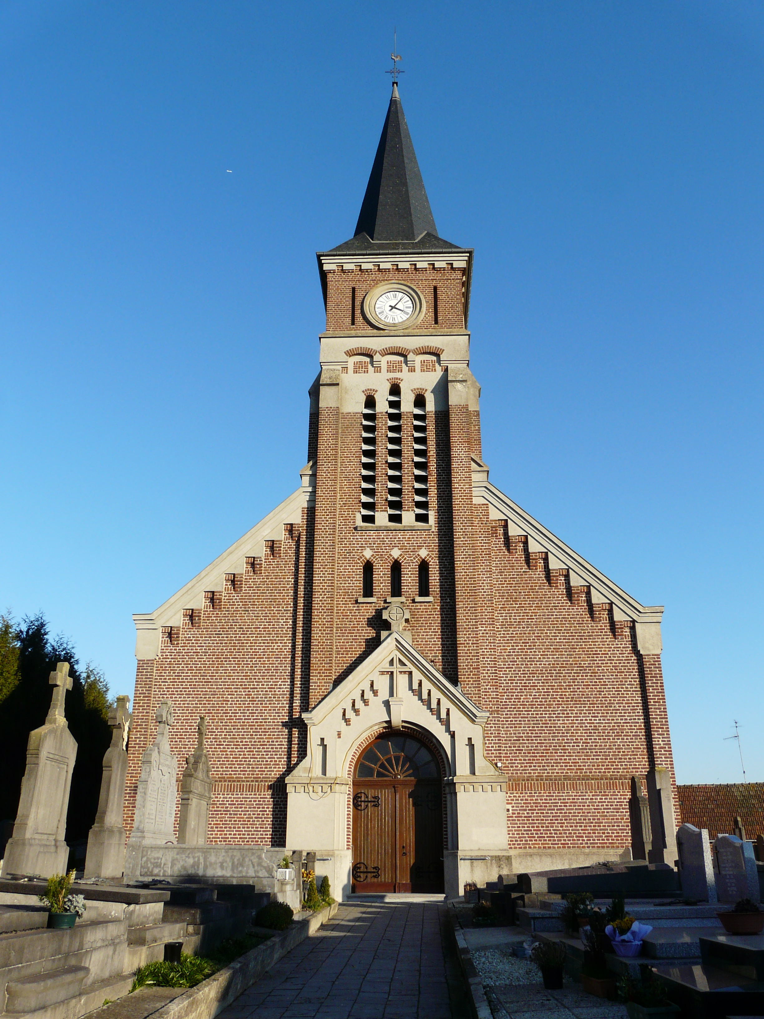 L'église de Sailly-lez-Cambrai